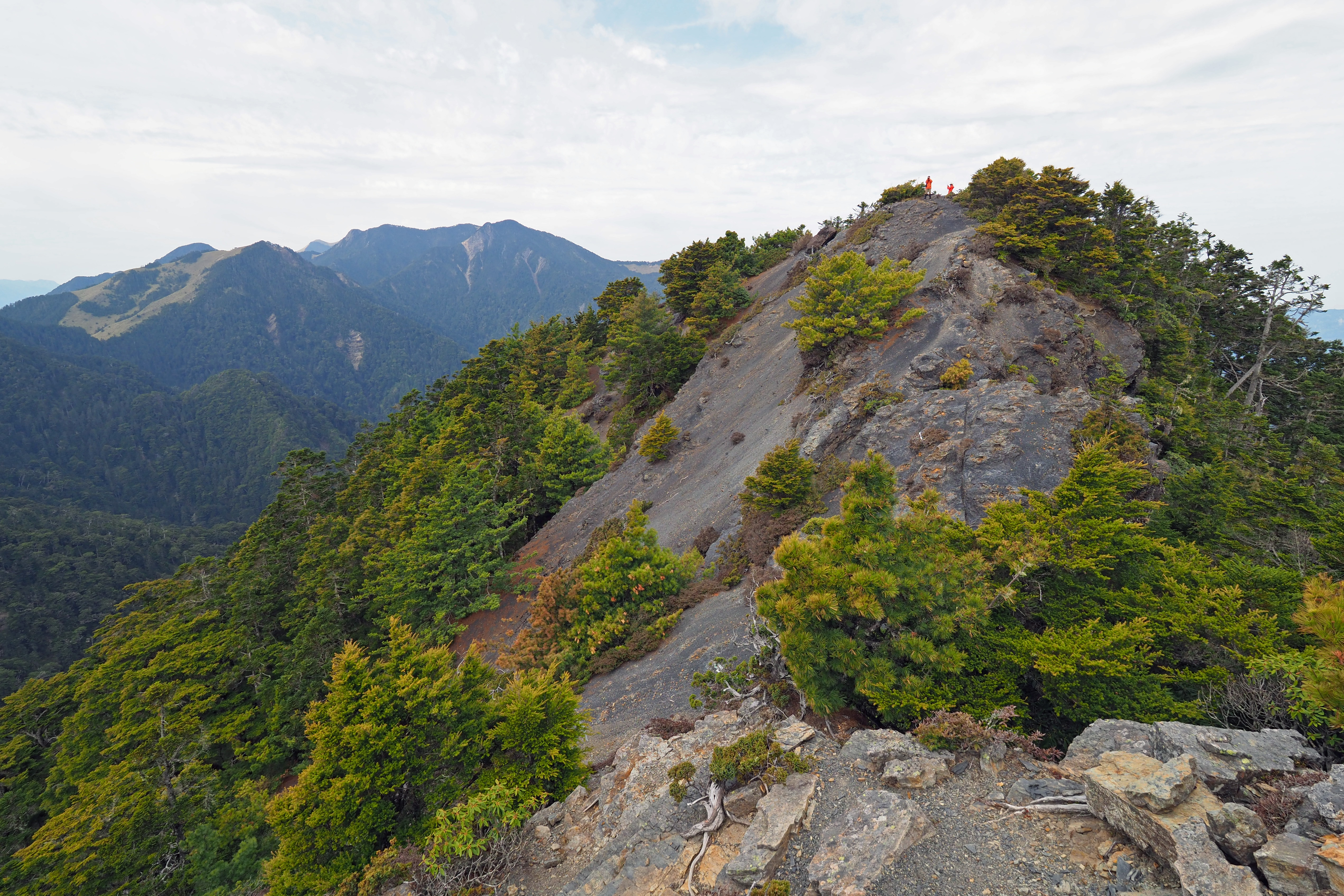 中文（台灣）: Mt.HuoShi 火石山